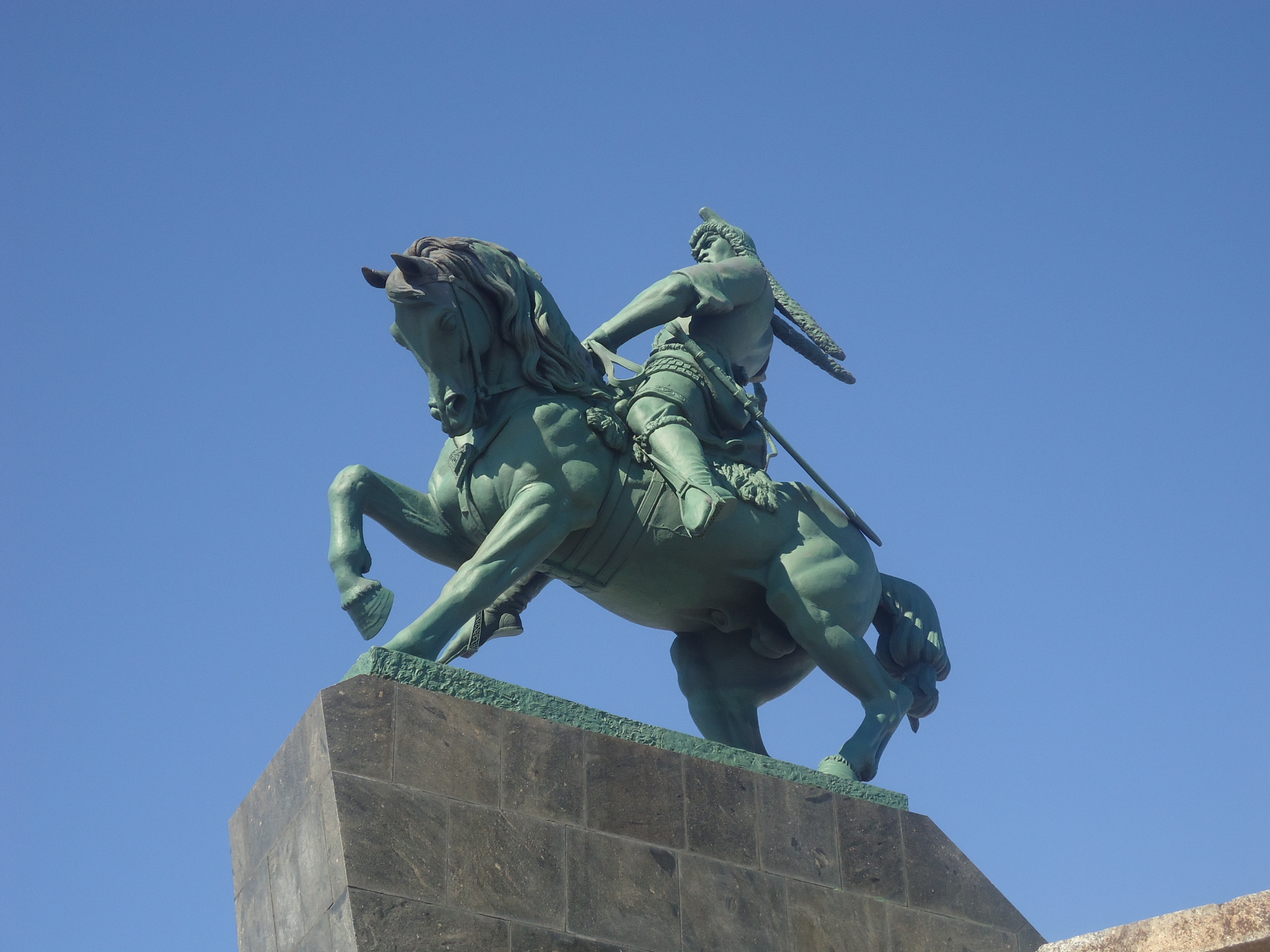 Башҡортса: Салауат Юлаев һәйкәле. Өфө.